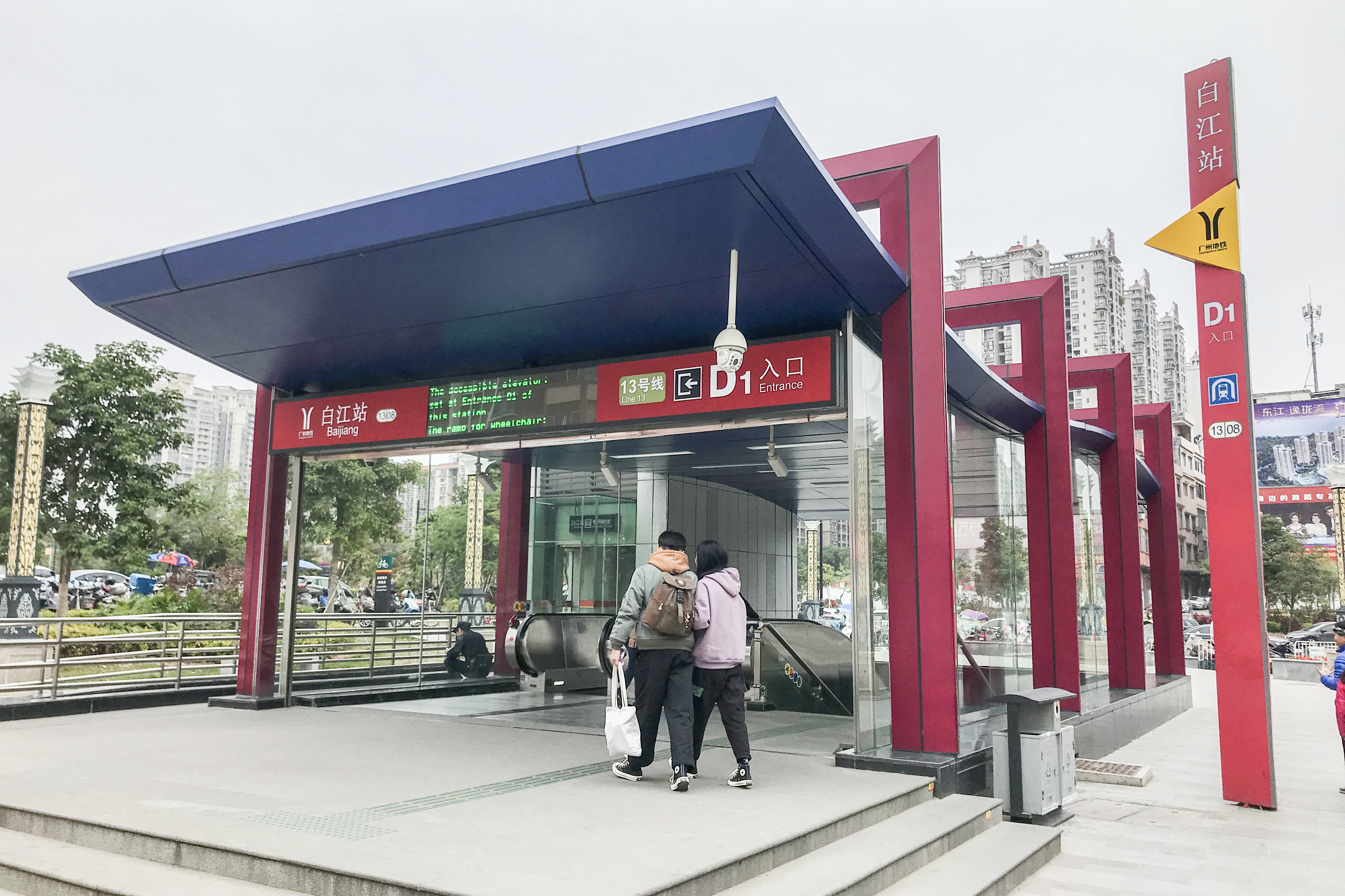 广州地铁白江站